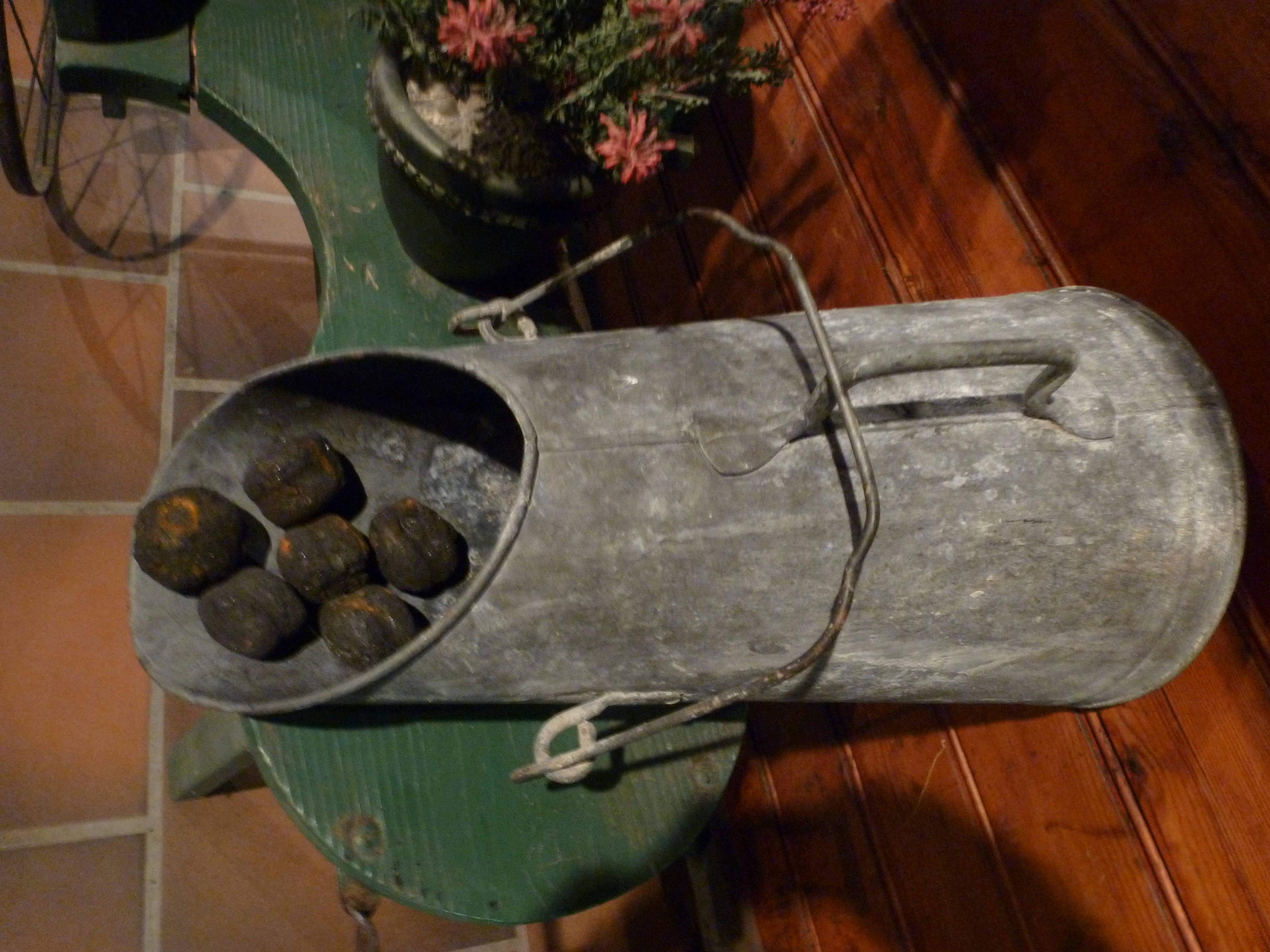 Broc de charbon en zinc avec anse et poignée à l'Historial de Pessac (château de Camponac).